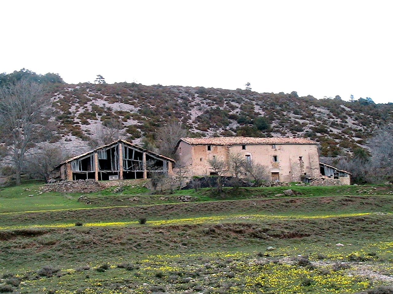 Masia de La Vila, al pla de Busa, sota el Serrat del Cogul, al municipi de Navès